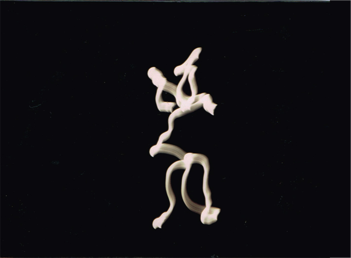 Photo de la lune par Sara Holt